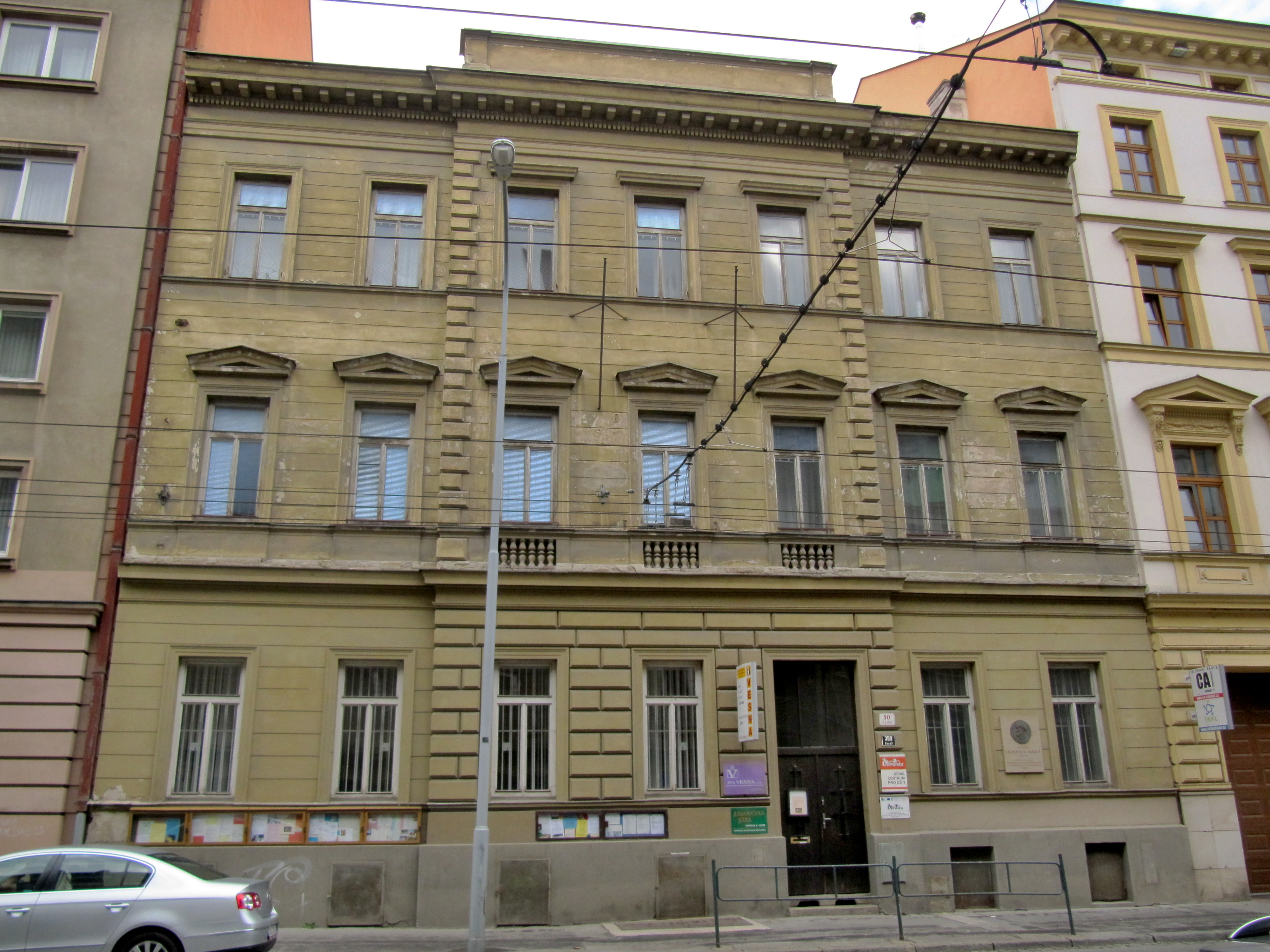 Škola Vesna (Brno), Brno - Veveří, Údolní 389/10, Brno